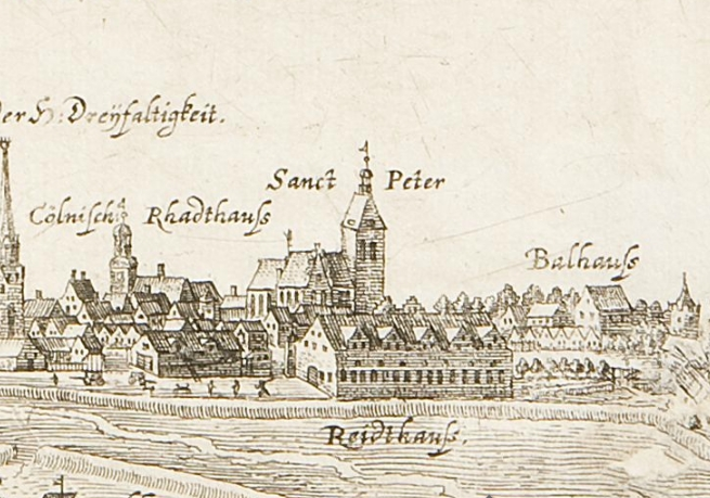 Ansicht des ersten Berliner Ballhauses 1635.